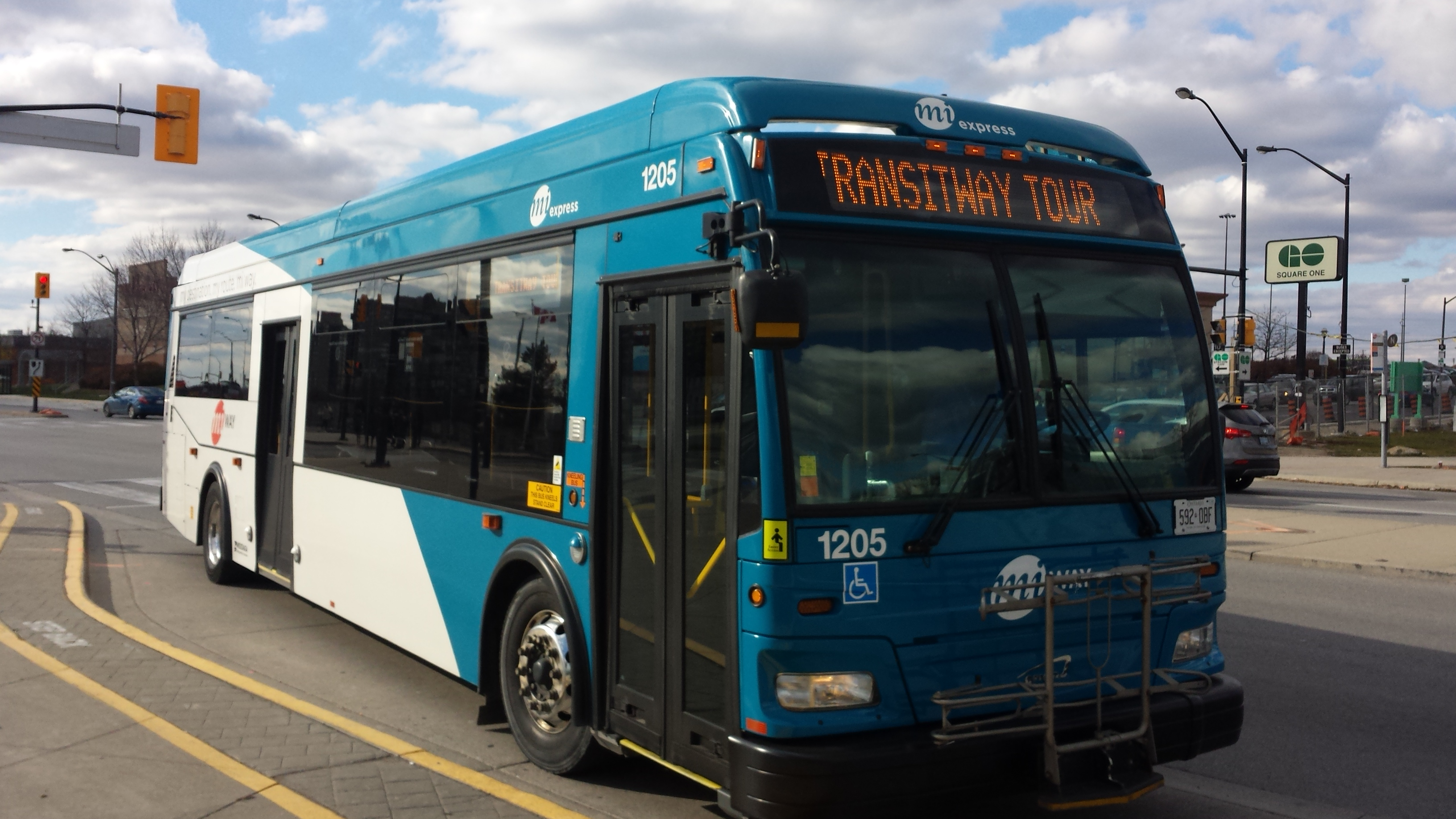 MiWay Orion VII NG EPA10 #1205